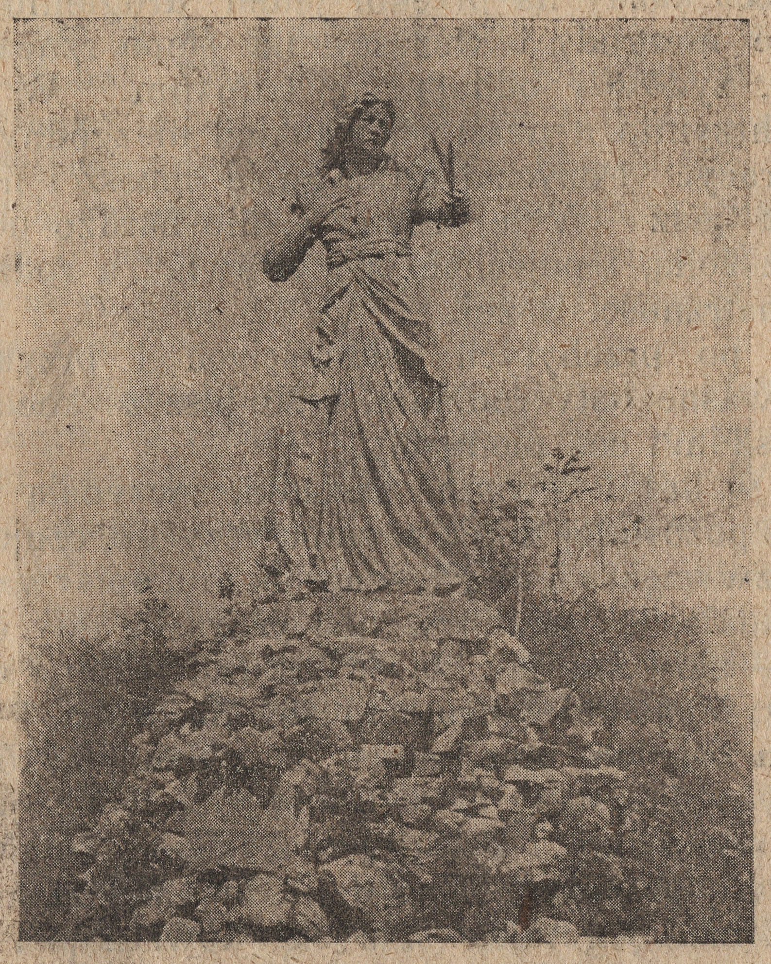 Trembowla, pomnik Annie Dorocie (Zofii?) Chrzanowskiej 1903